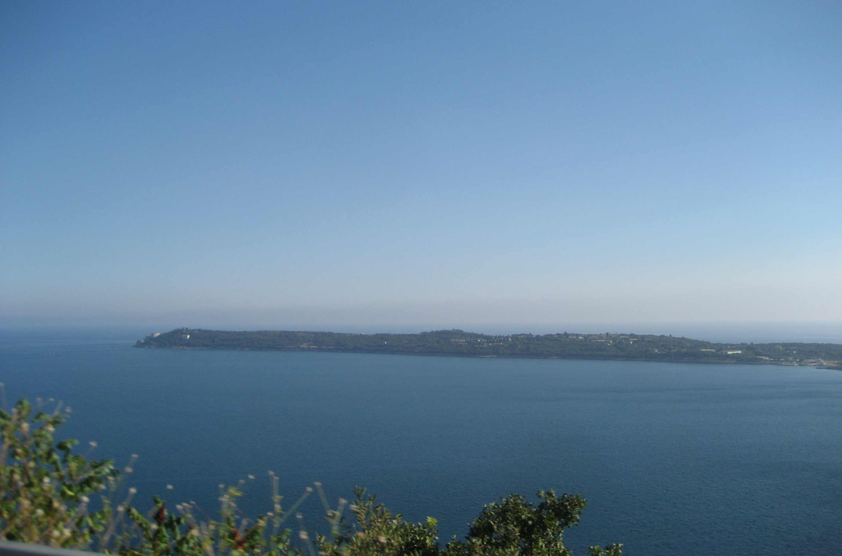 Prevlak, Croatia